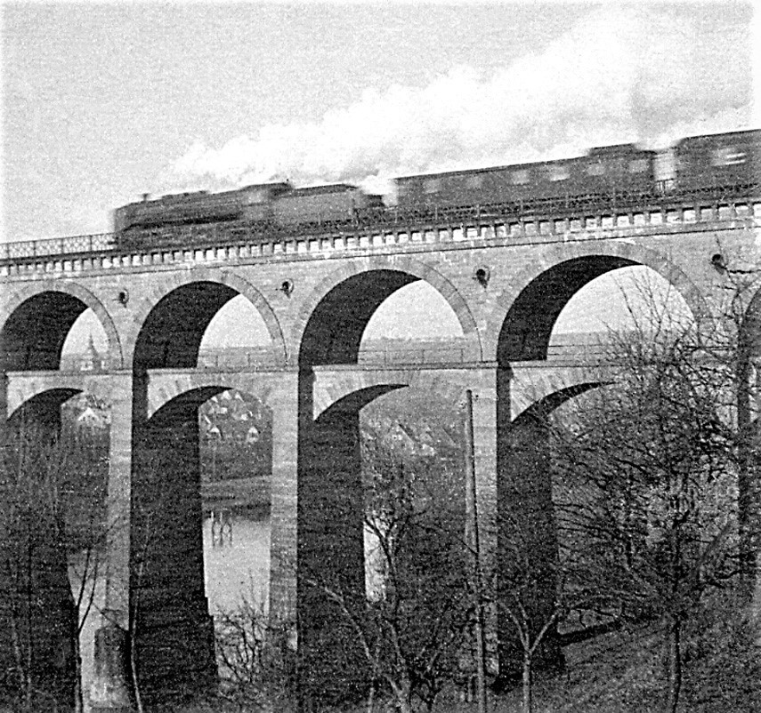 Eisenbahnviadukt über die Enz bei Bietigheim, erbaut 1851 bis 1853. Foto von 1926 vor der Verbreiterung des Viadukts in den Jahren 1928 und 1929